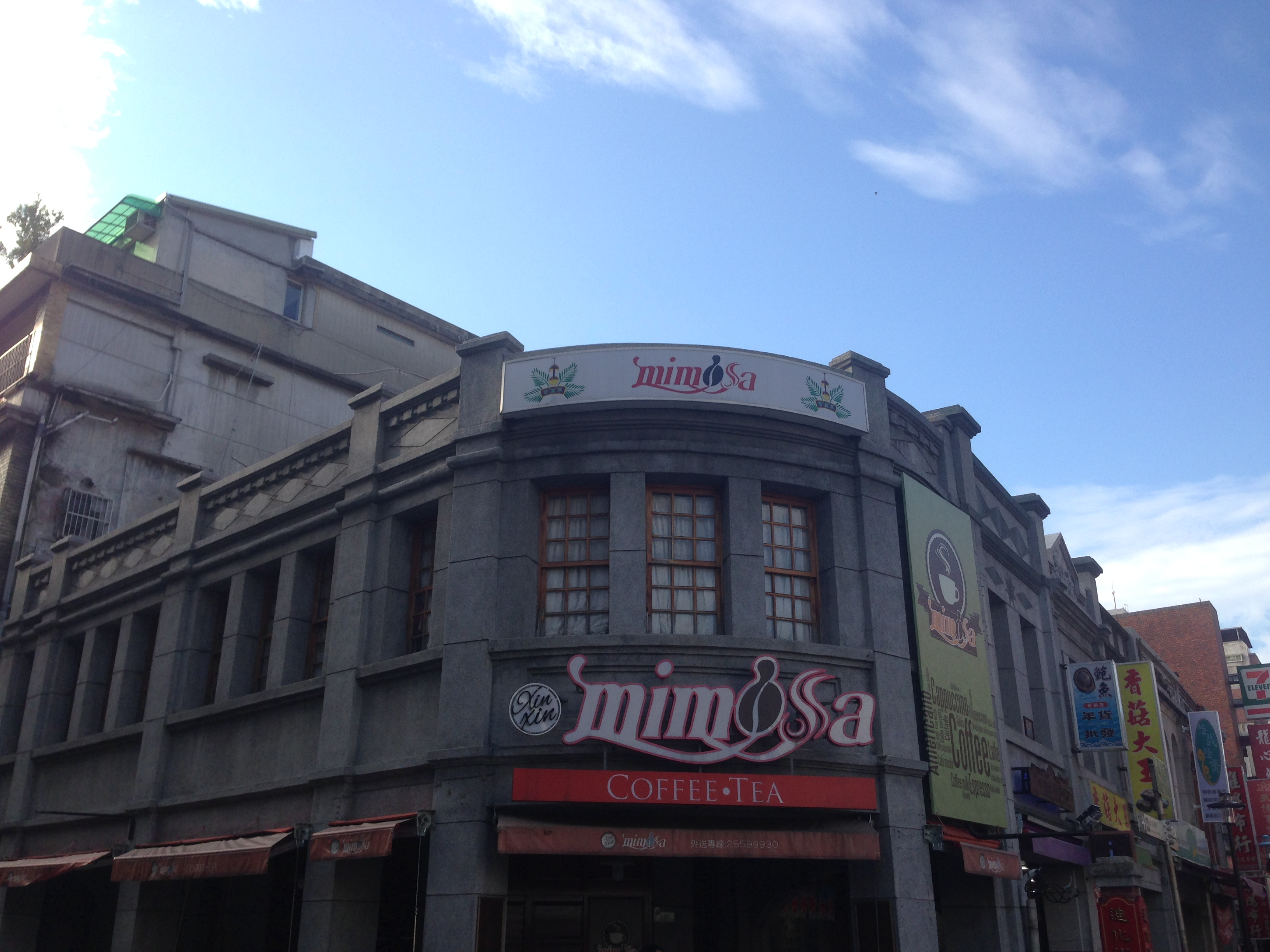 中文（台灣）: 臺北市大同區南京西路237號暨迪化街一段2、4、6號店屋。